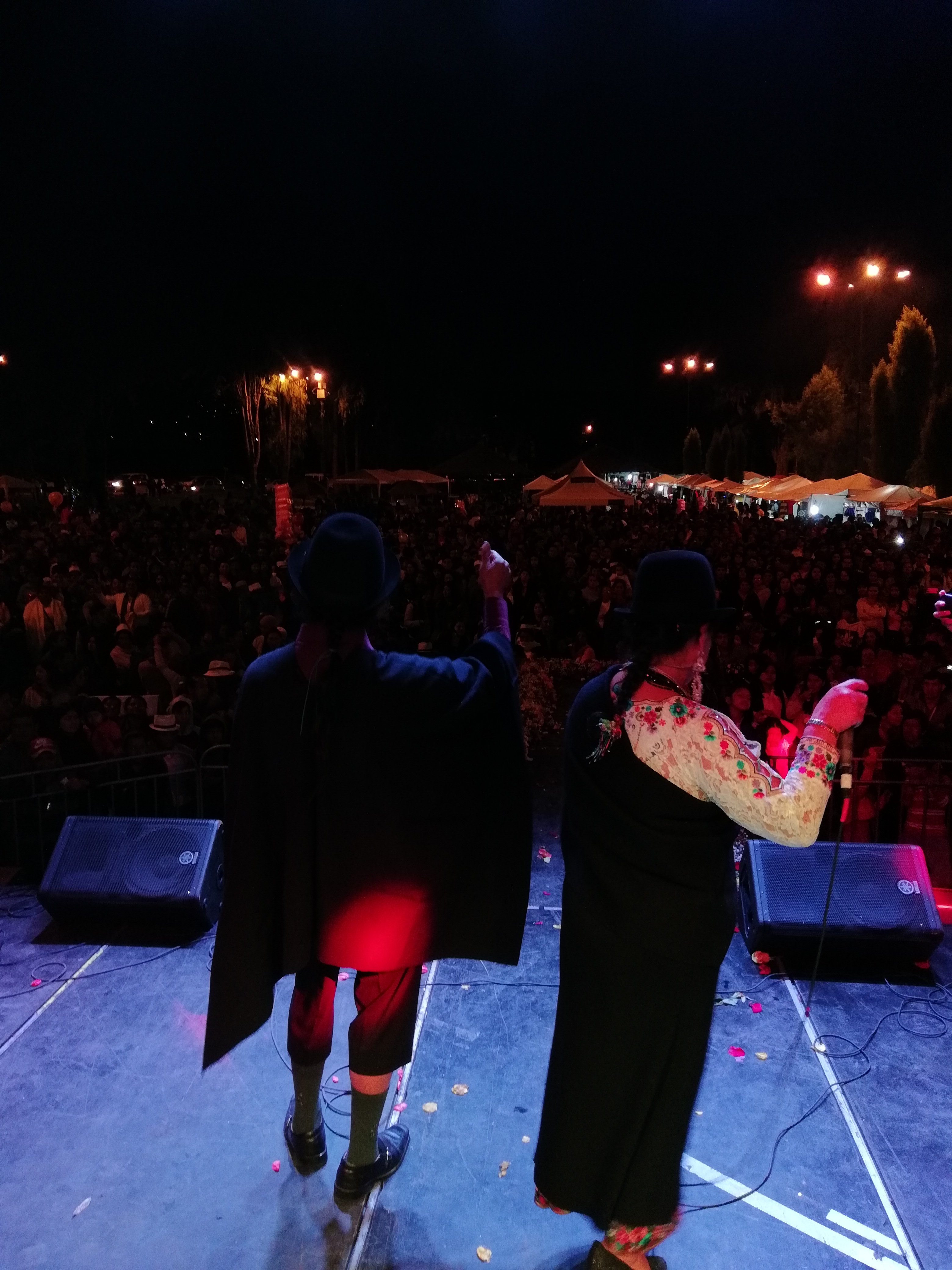 Los Zhunaulas en conciertos en vivo